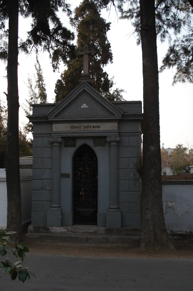 Tumba de Domingo Santa María en el Cementerio General de Santiago de Chile.